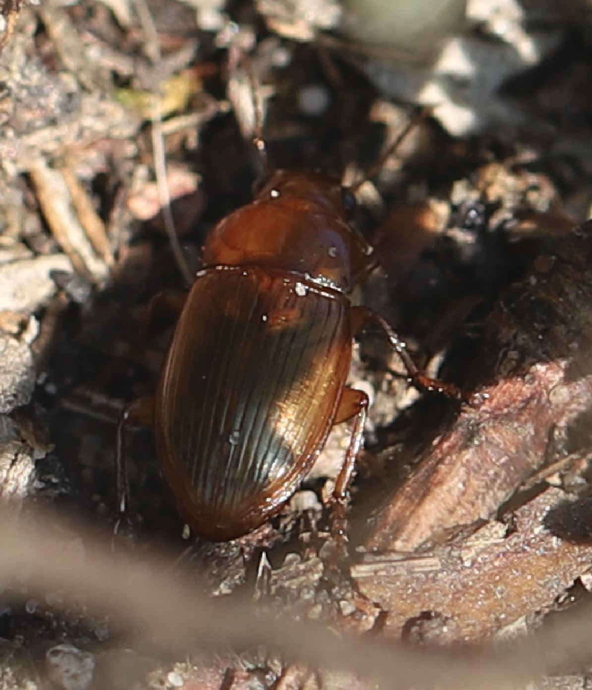 Laufkäfer Harpalus flavescens am 15. August 2020 in der Schwetzinger Hardt